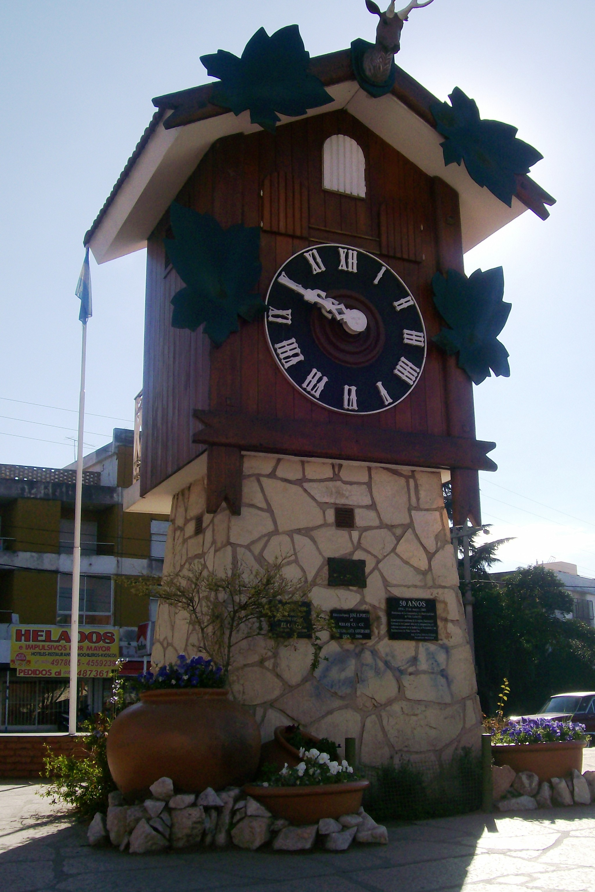 Reloj cucu, tipica postal de Villa Carlos Paz